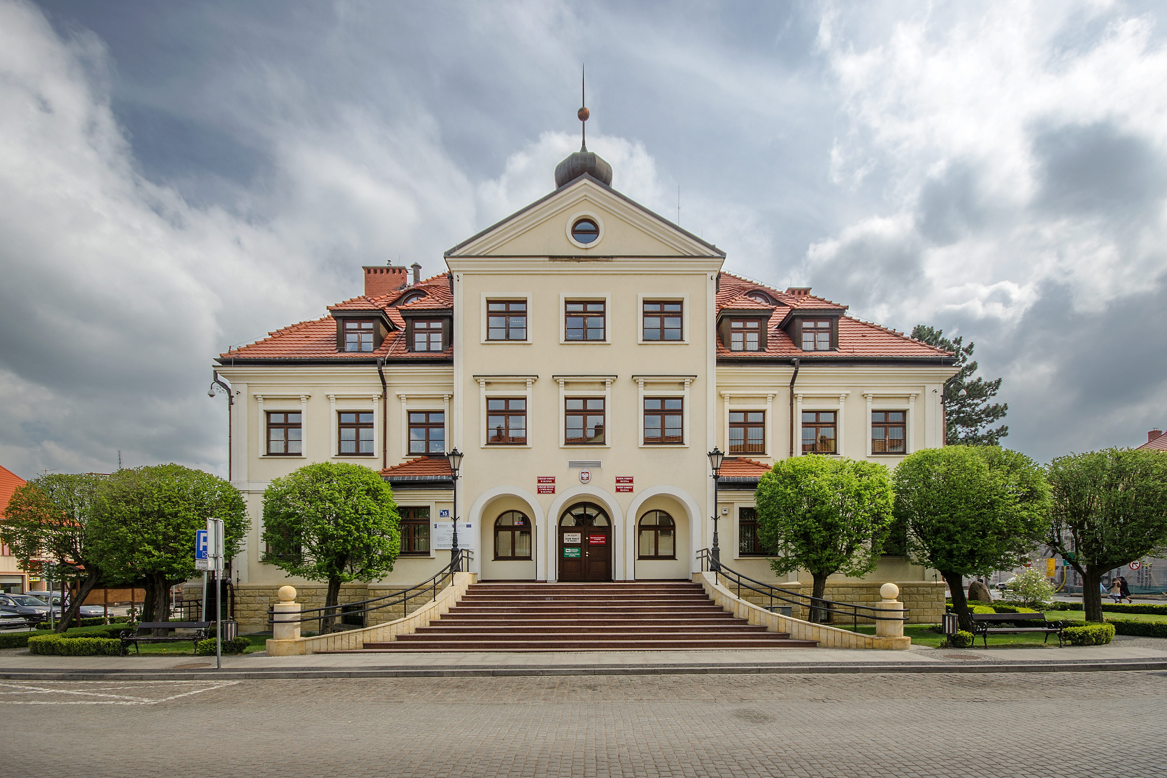 Rudna, woj. dolnośląskie, gm. Lubin - ratusz